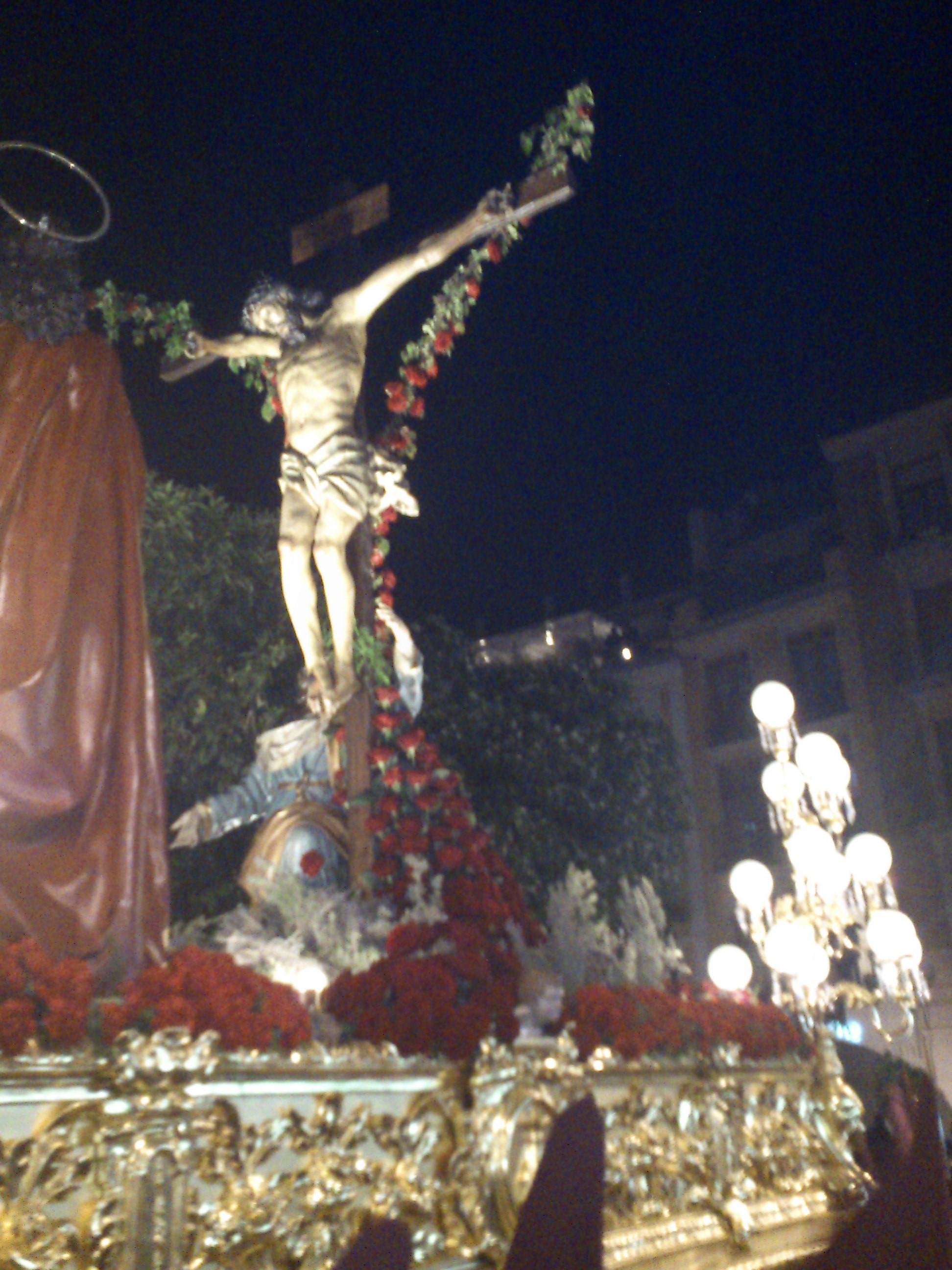 Detalle del paso del Cristo del Perdón (Murcia)